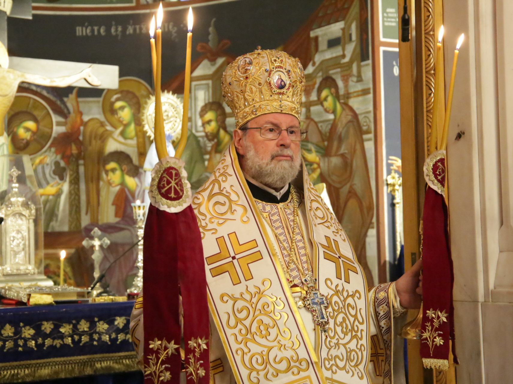 Ο Μητροπολίτης Αχαϊας Αθανάσιος